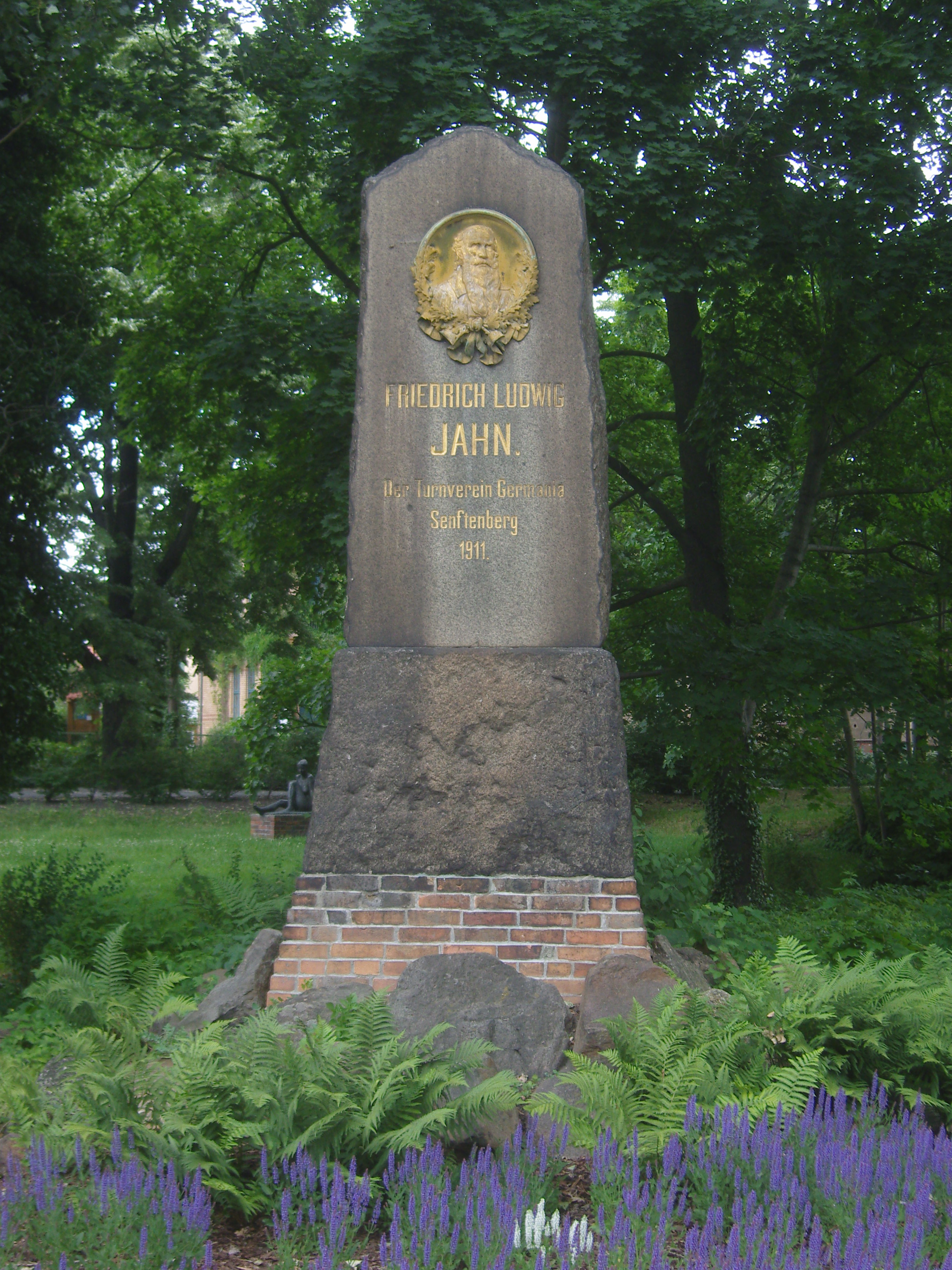 Denkmal für Friedrich Ludwig Jahn im Schlosspark in Senftenberg